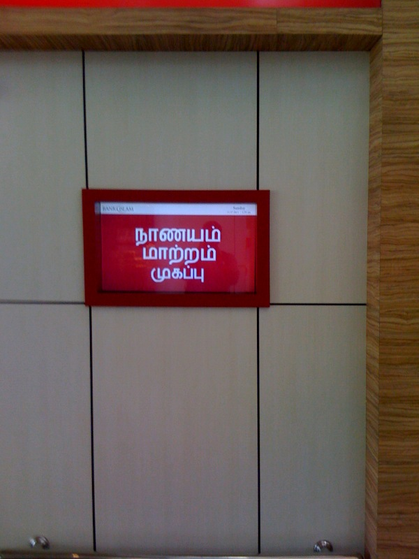 கோலாலம்பூர் பன்னாட்டு விமான நிலையத்தில் உள்ள நாணய மாற்று மையத்தில் உள்ள தமிழ் பாதகை.